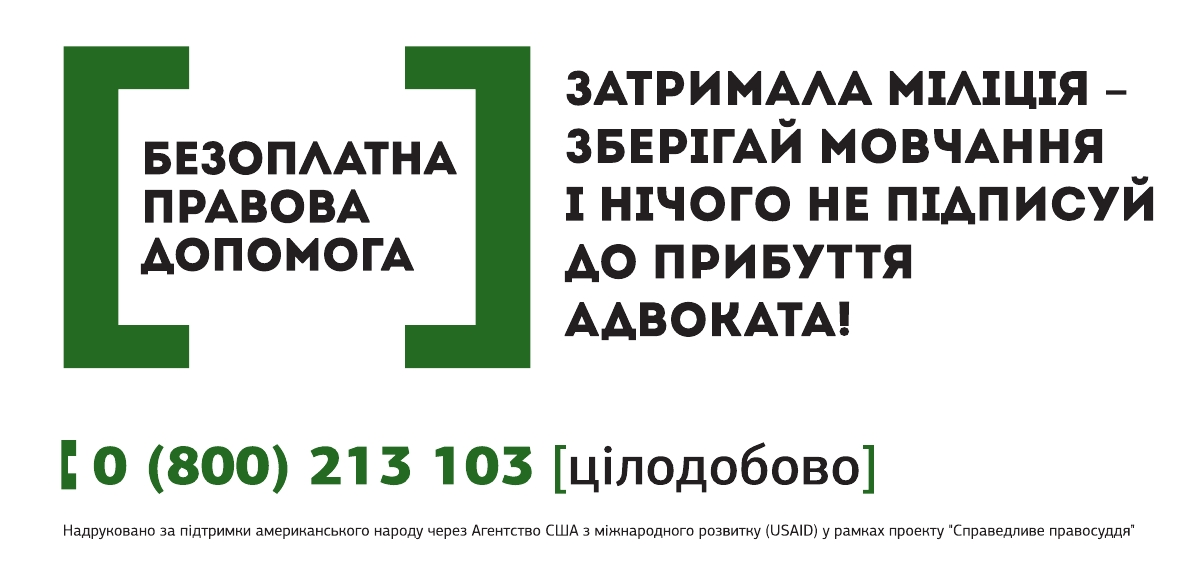 Безоплатна правова допомога - телефон